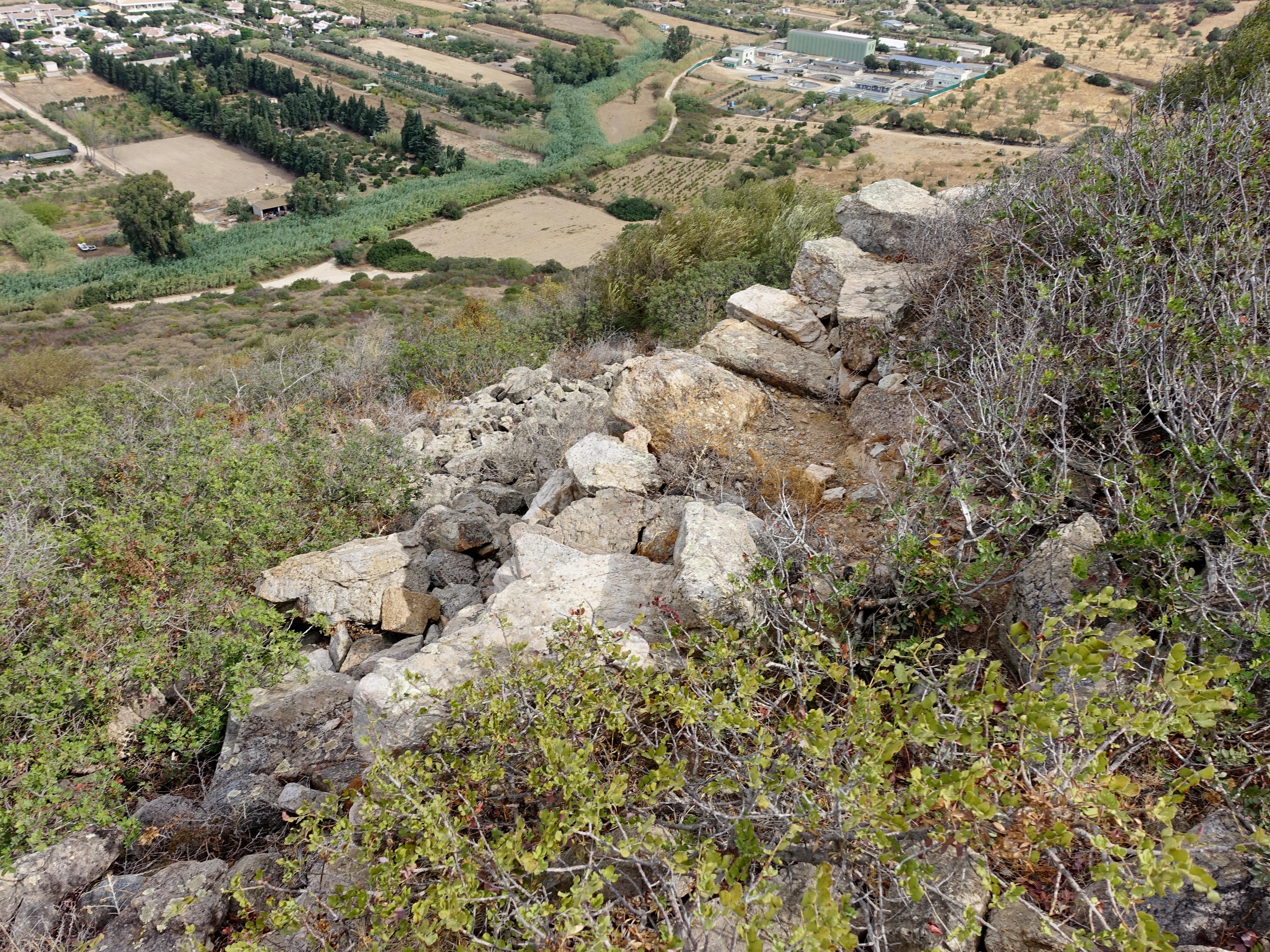 Nuraghe von Cuccureddus, Gemeinde Villasimius, Sardinien, Italien